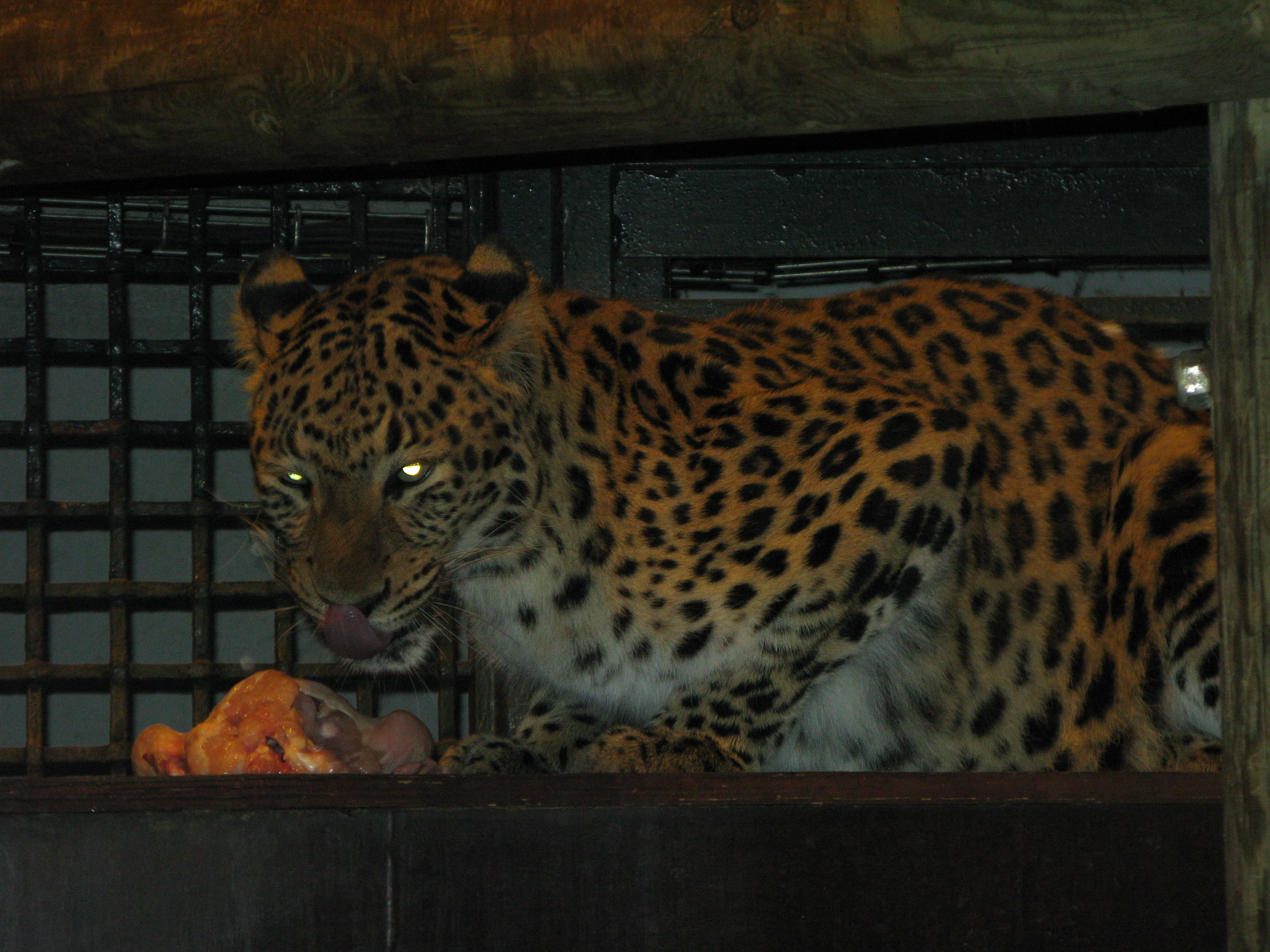 Panthère de Chine du Nord (panthera pardus japonensis) mangeant, ménagerie du Jardin des Plantes de Paris.